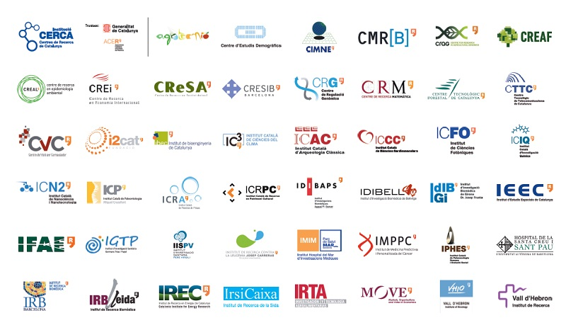 Els centres CERCA